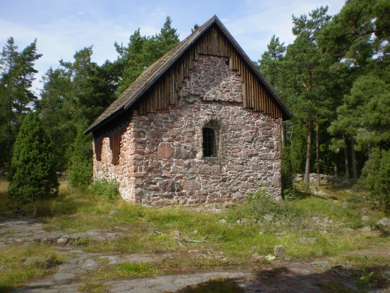 Sjöfararkapellet Sankt Olofskapellet, Lemböte, Åland